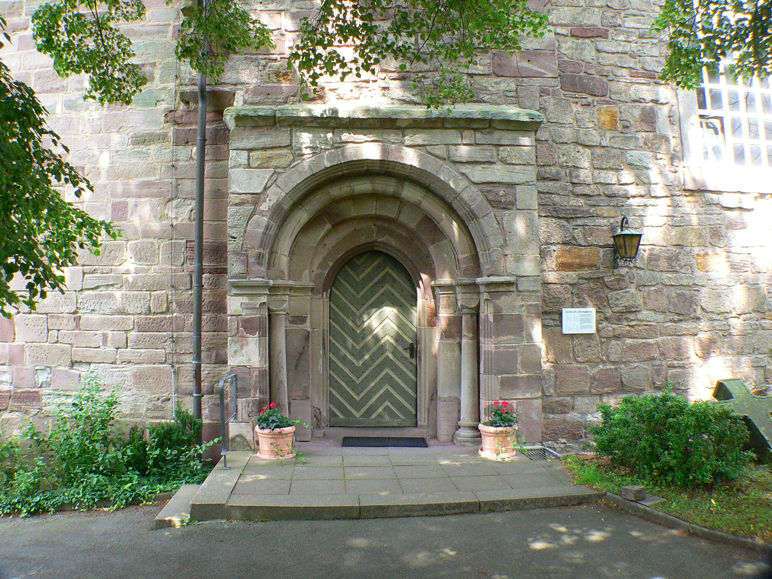 Eingangsportal der Klosterkirche Reinhausen (Deutschland)